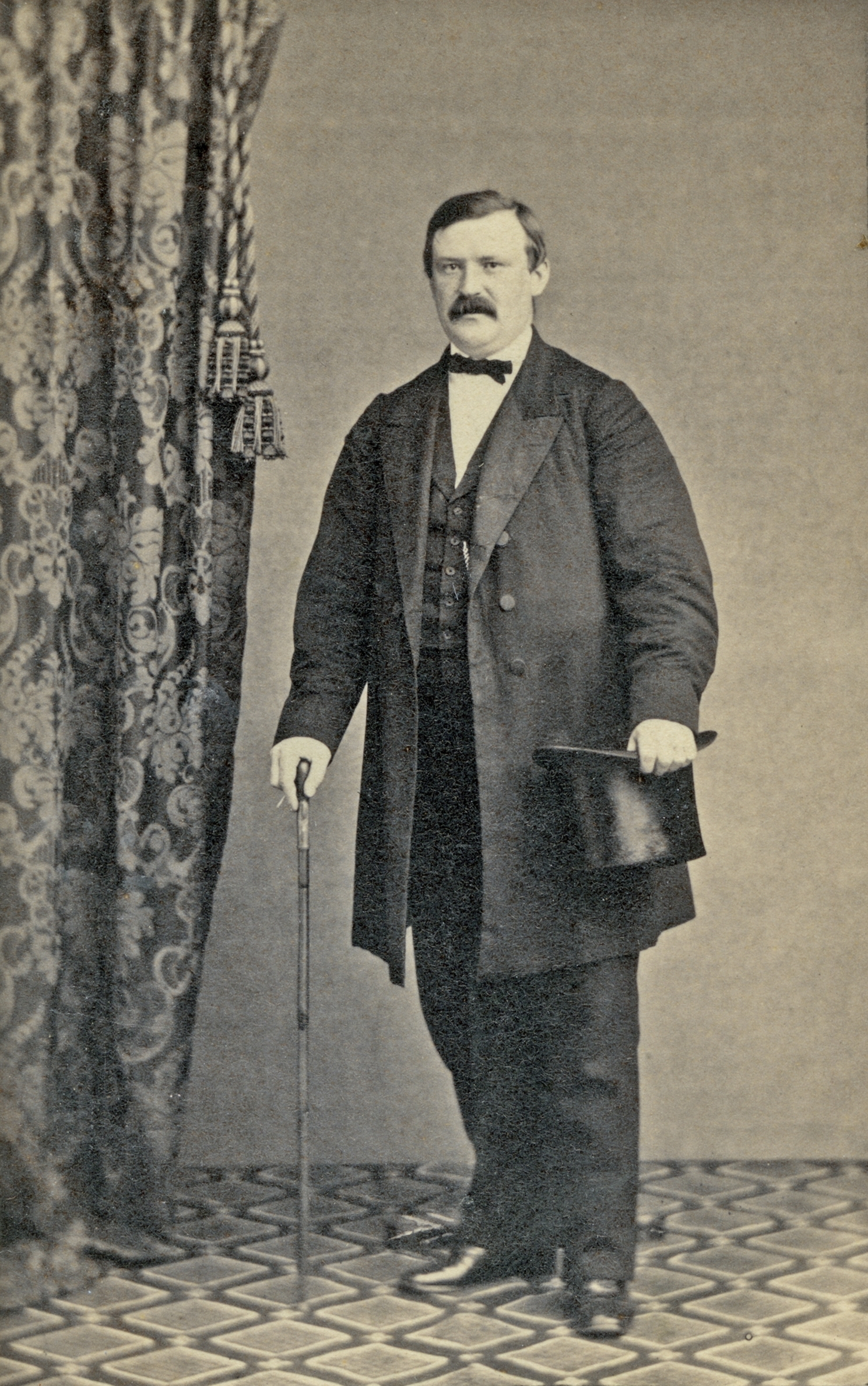 Porträtt av lektor Lars Fredrik Isander (1828–1893).